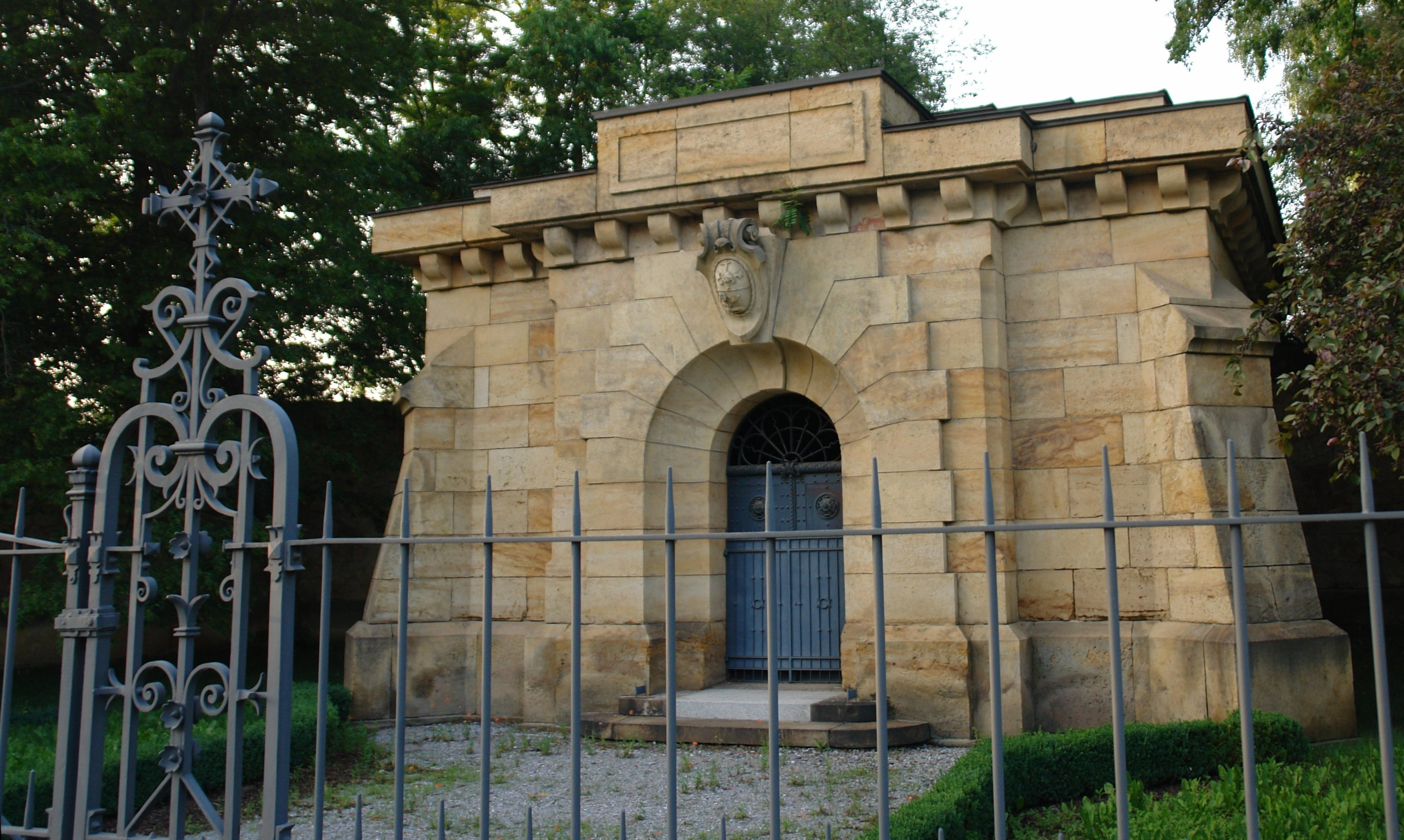 Fabrice Mausoleum; Ruhestatte von Alfred_von_Fabrice, gebaut von Schilling & Graebner